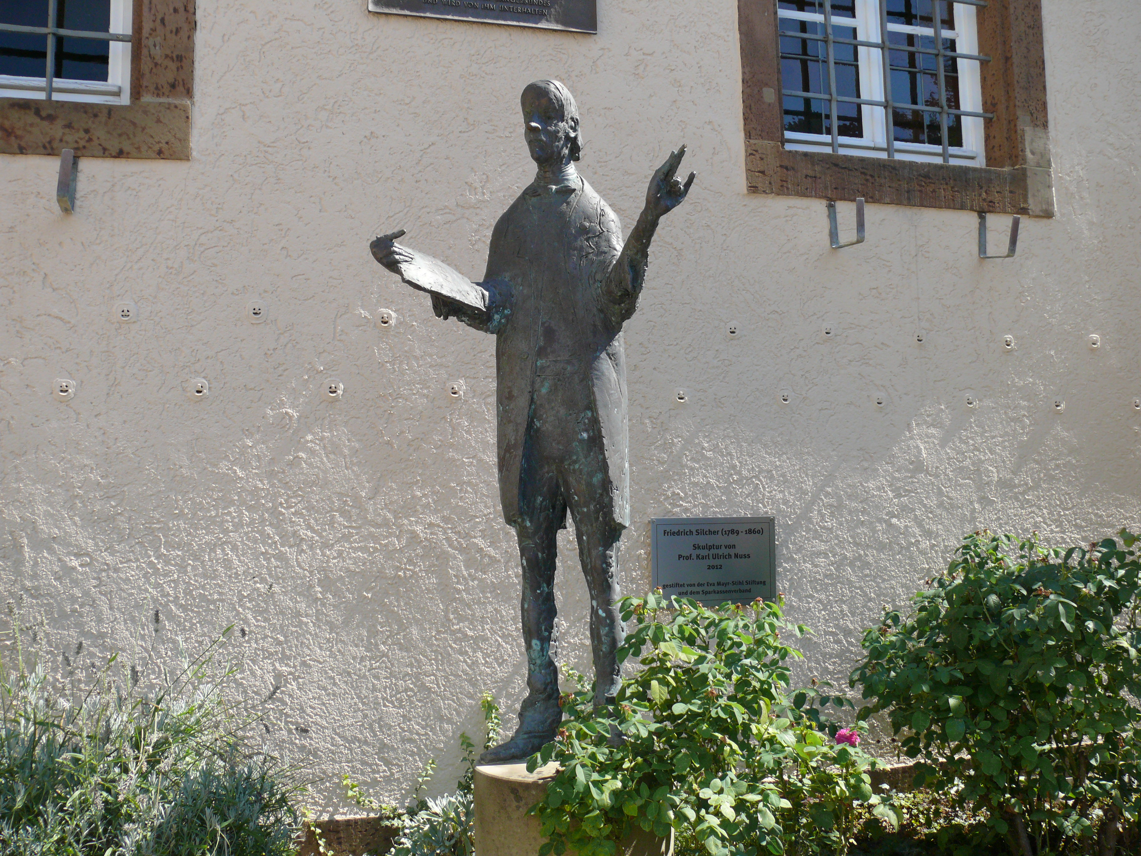 Denkmal von Karl Friedrich Nuss zu Ehren von Friedrich Silcher vor dem gleichnamigen Museum in Weinstadt-Schnait.